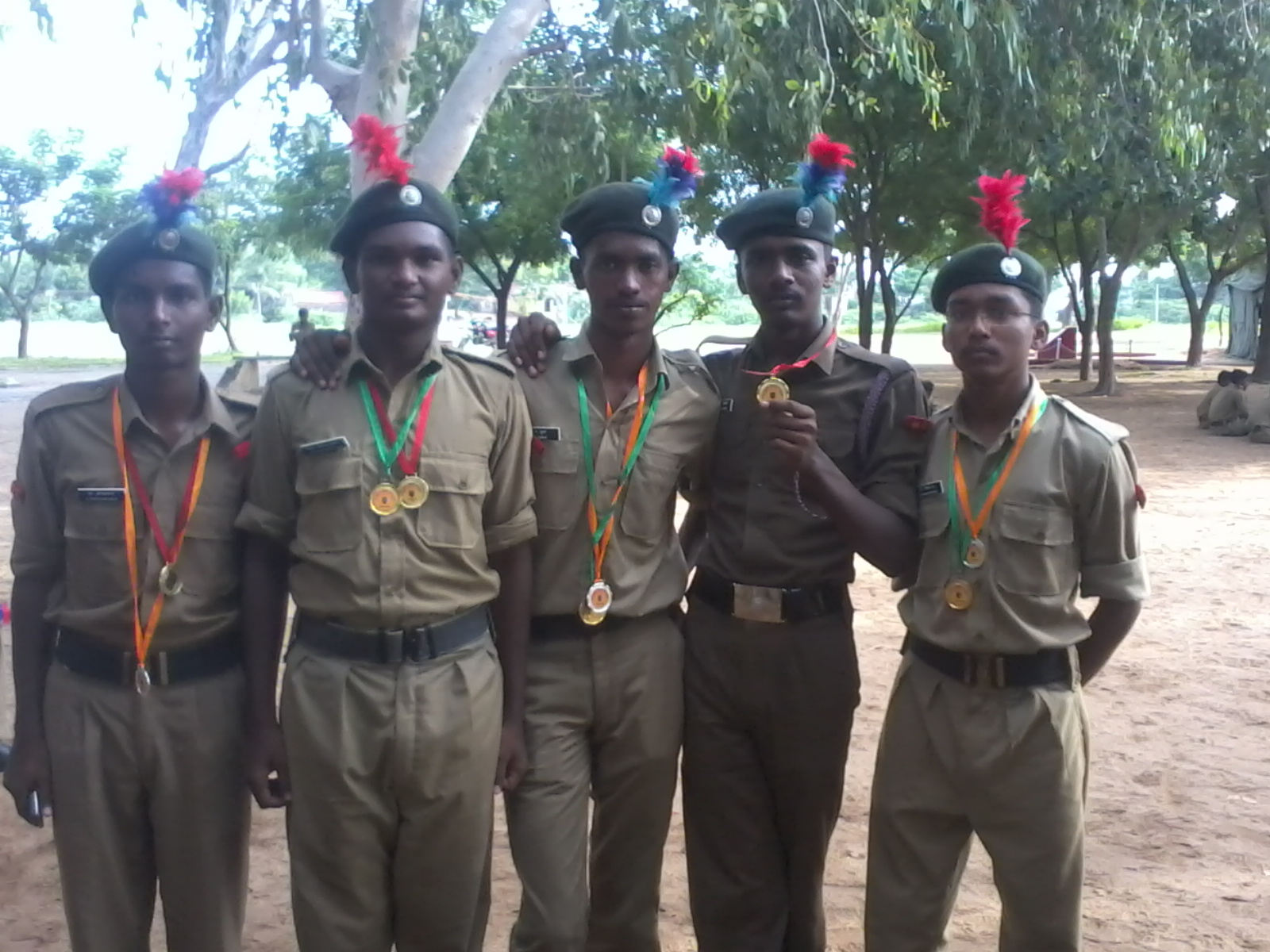 தேசிய மாணவர் படை மாணவர்கள்